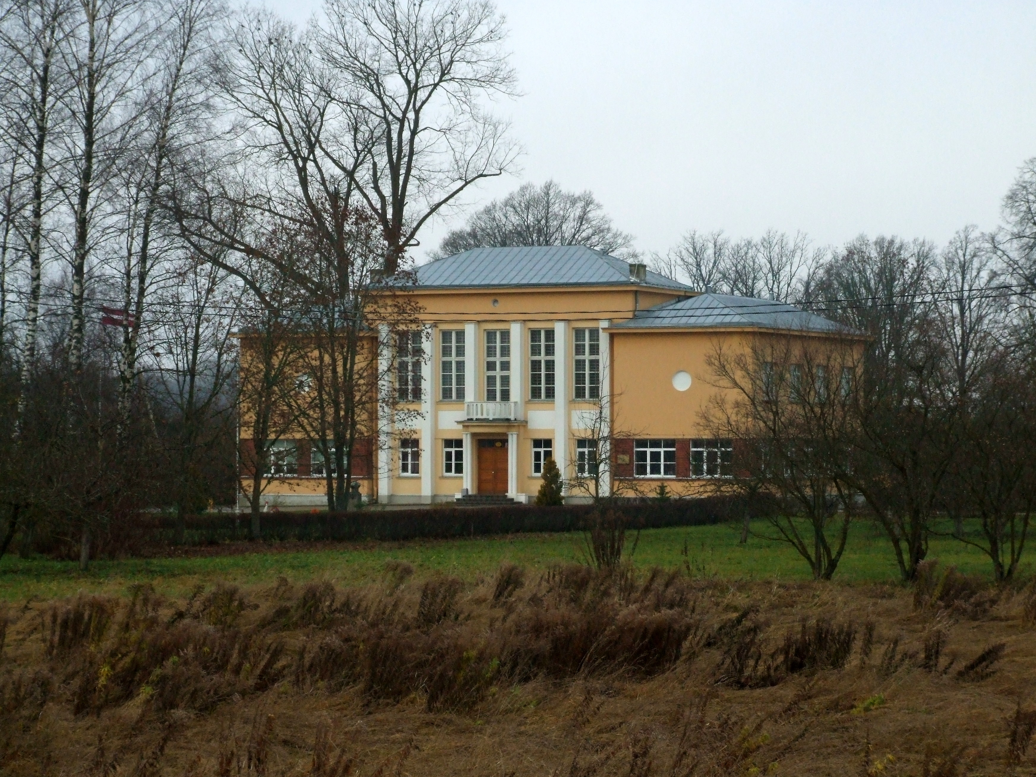 Jaunburtnieku skola